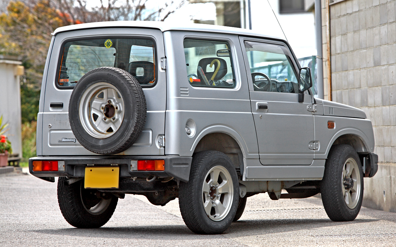 Suzuki Jimny 660 Hardtop XL ( JA12W )